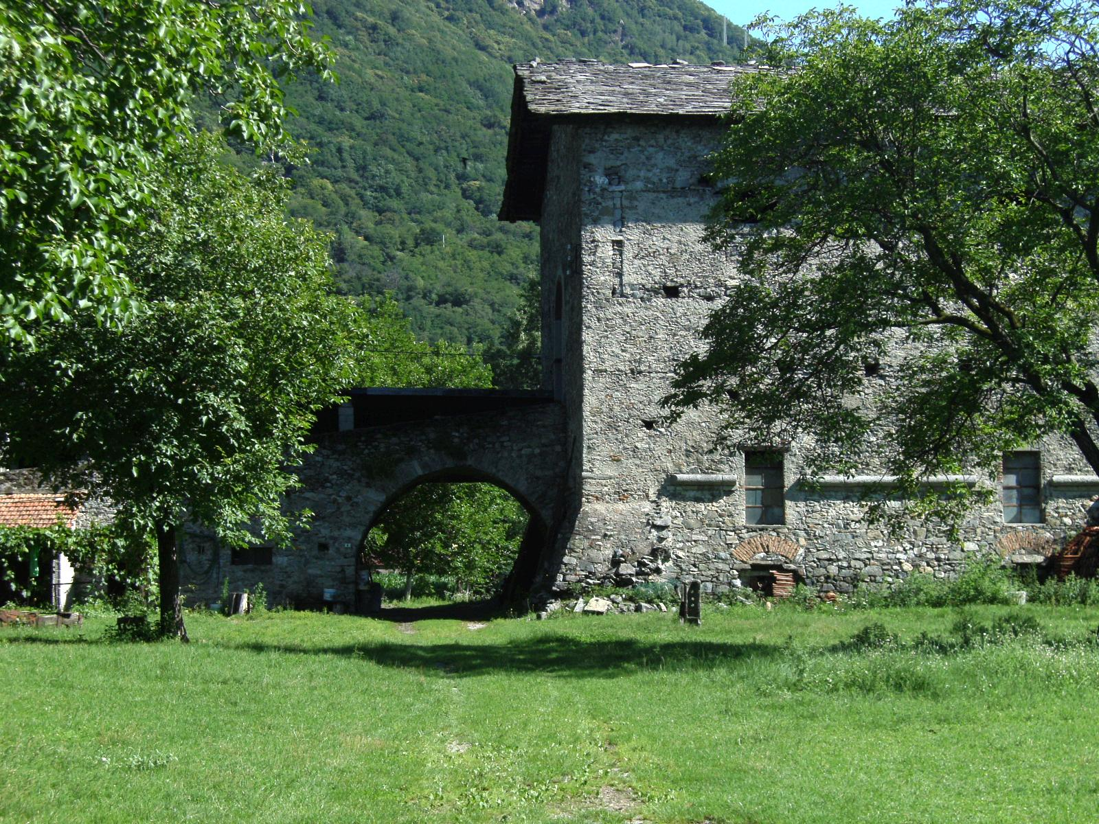 Il forte d'Adda. Lumbaart: El fòrt d'Adda, voruu di Spagnoeu.